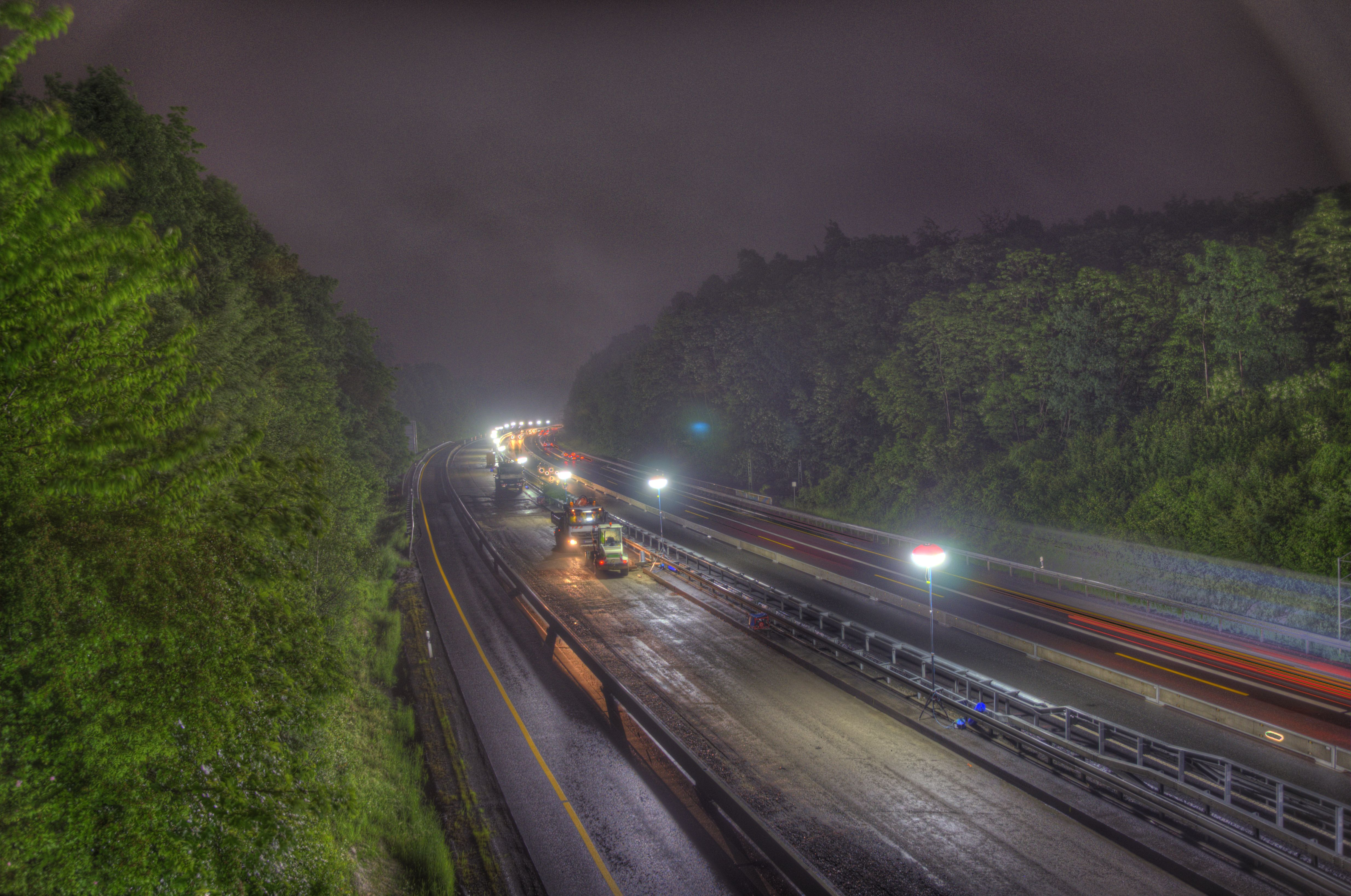 Nachtbaustelle auf der A 485 bei Gießen/Linden